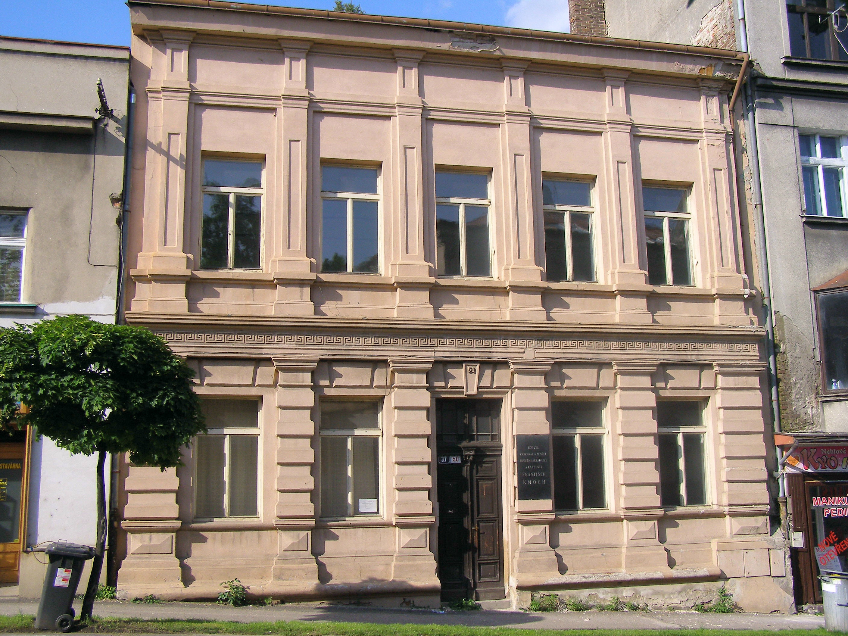 Das Haus in Kolín (Kutnohorská 37), in dem der Komponist František Kmoch lebte und starb